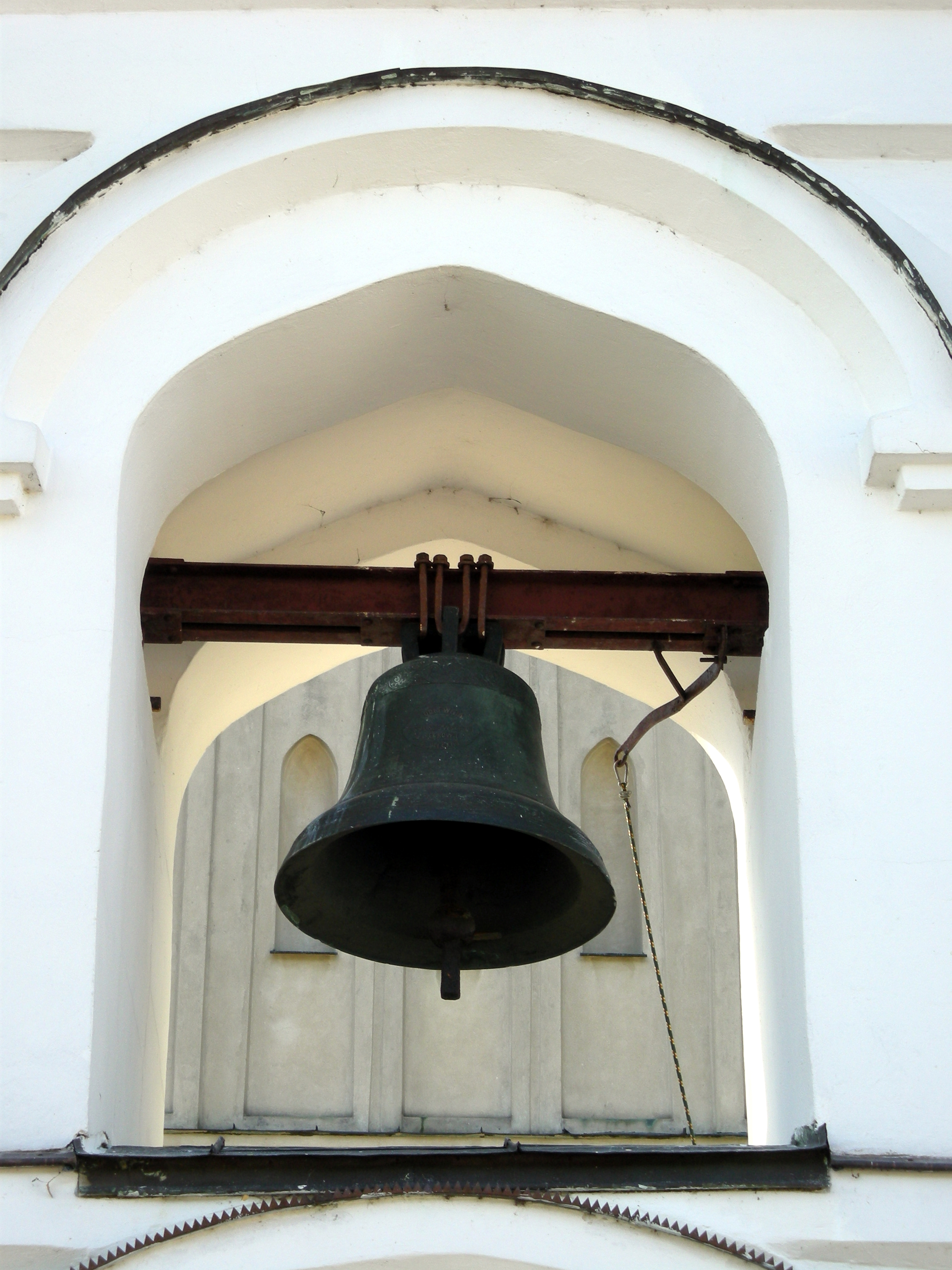 Dzwonnica-brama kościoła parafialnego w Huszlewie.